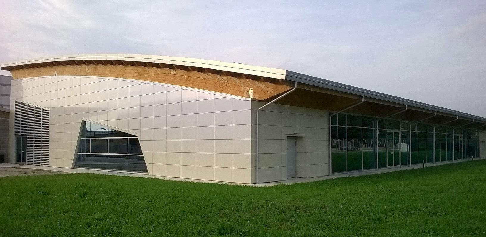 Castel Goffredo, piscina comunale coperta.